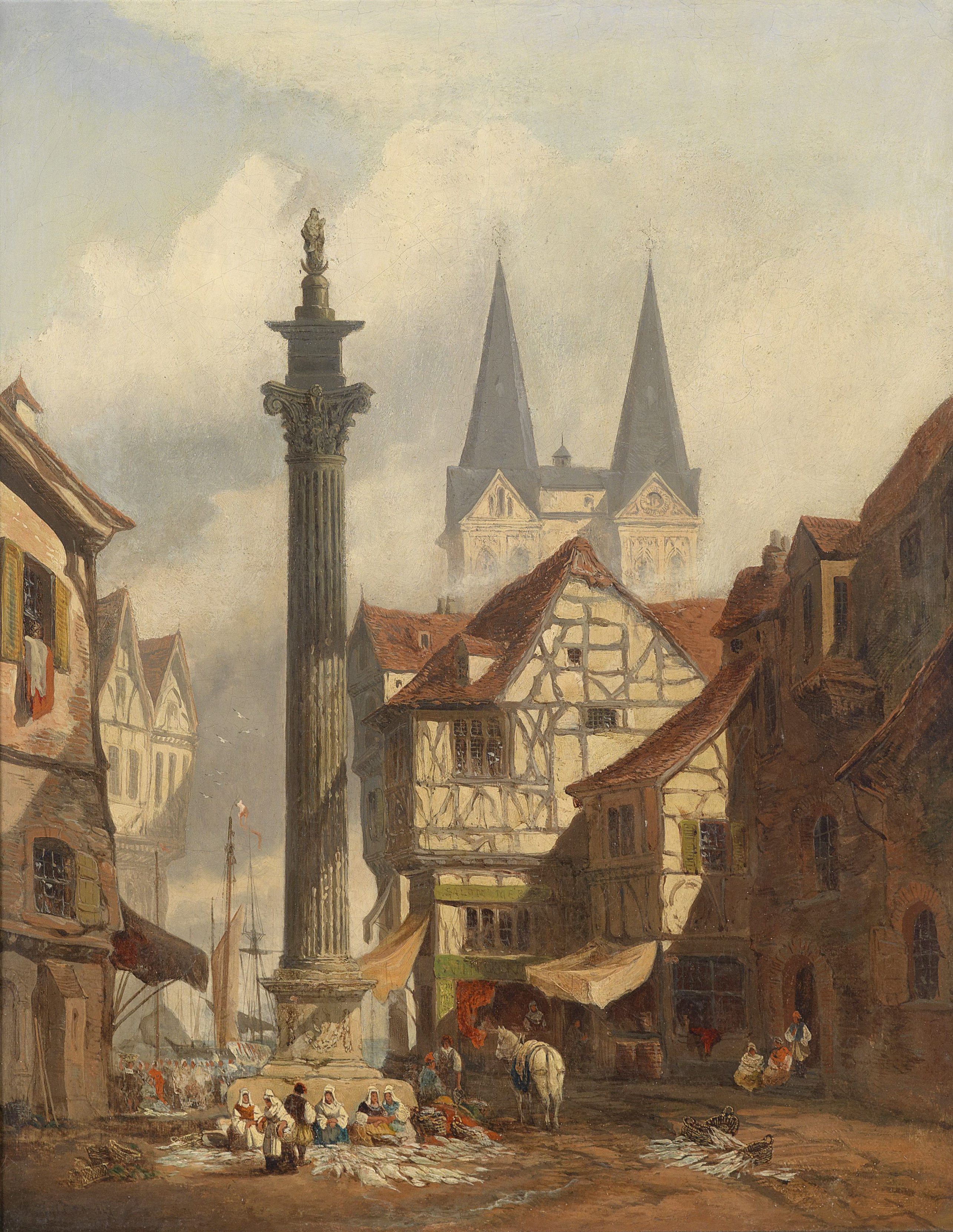 Eine Stadtansicht mit Fischmarkt